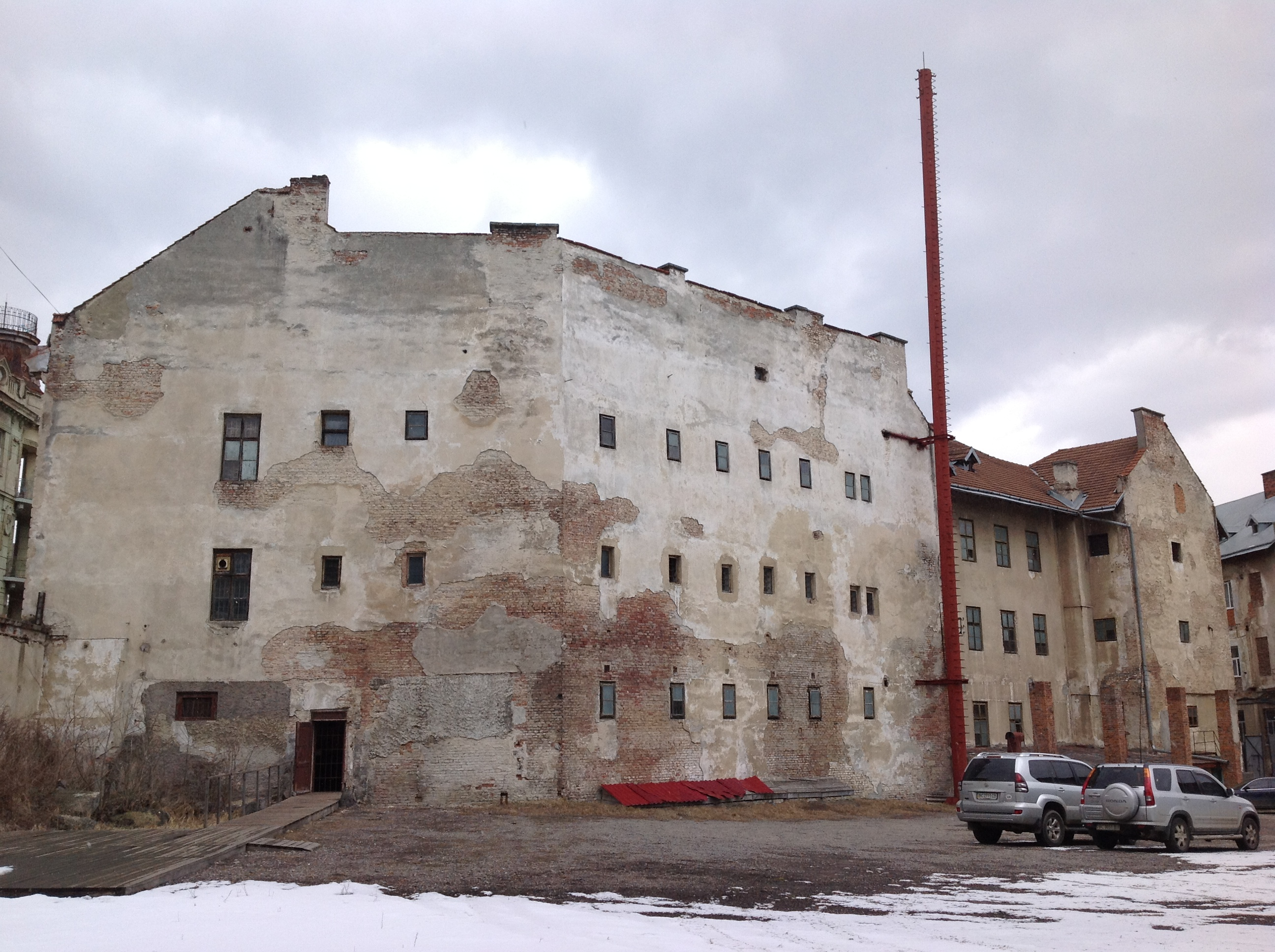 Львів. Тюрма на Лонцького. Вид з тюремного подвір'я